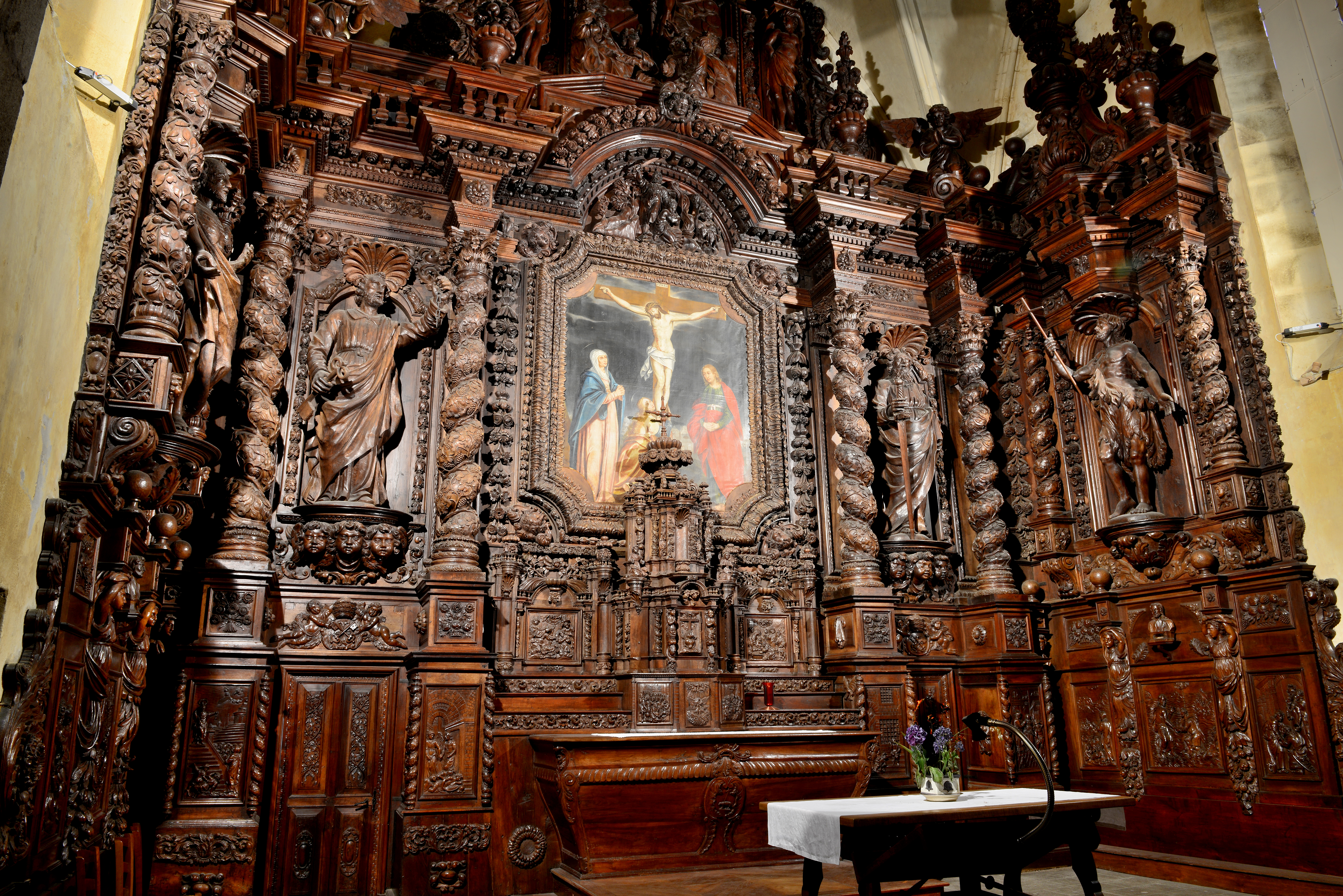 Église Saint-Pierre de Naves, maître-autel avec retable et sa toile Calvaire avec sainte Madeleine.